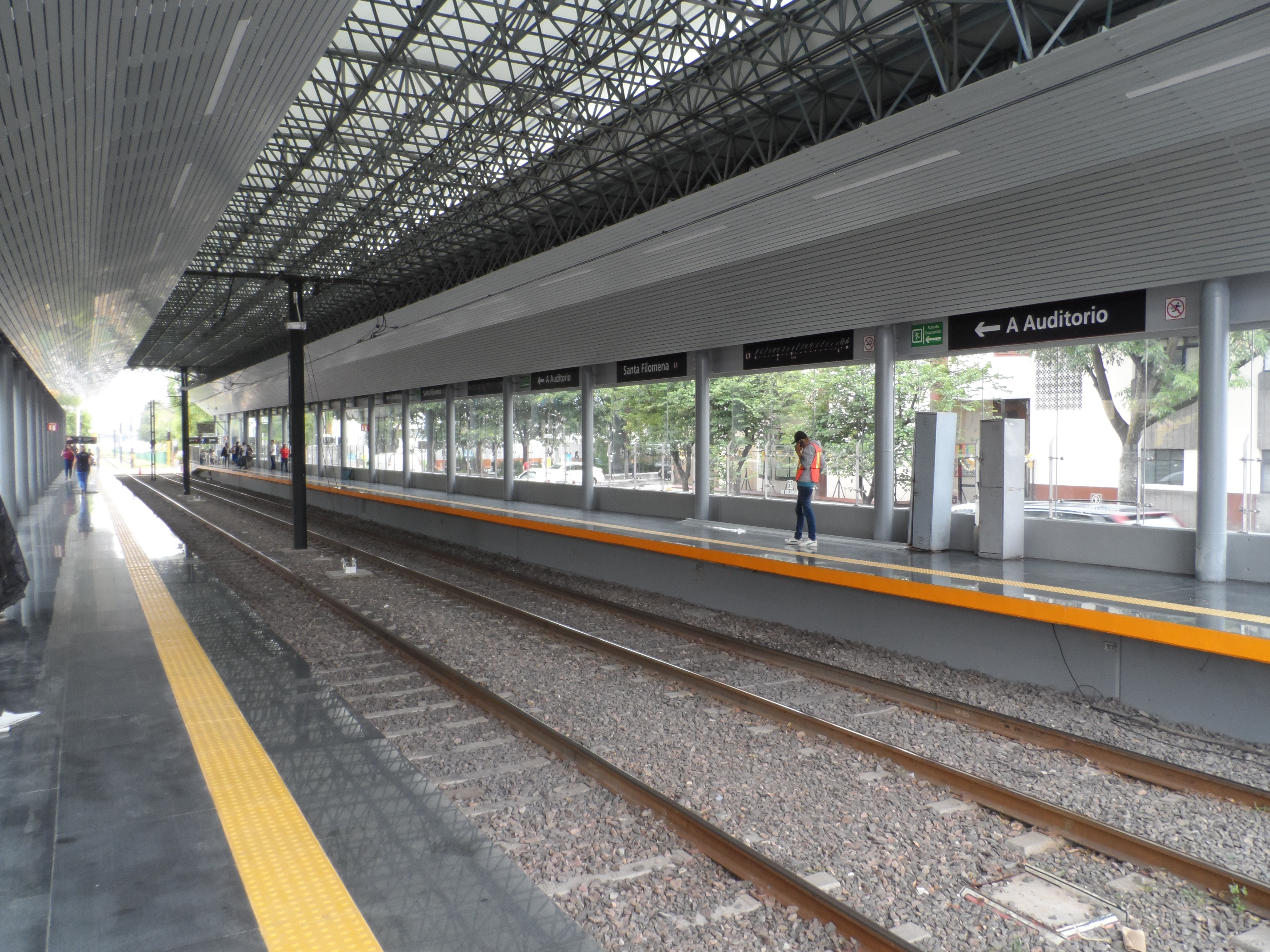 Andenes de la estación "Santa Filomena" de la Línea 1 del Tren Ligero de Guadalajara.